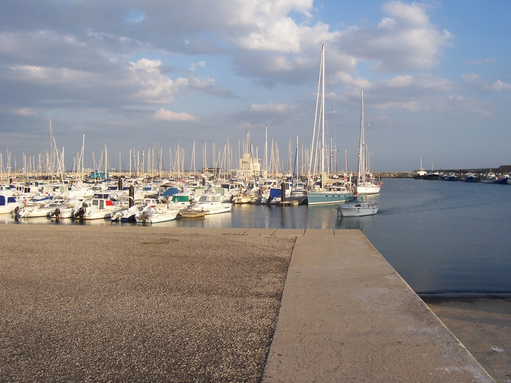 Vista parcial del puerto de Rota-Cádiz-Andalucía-España